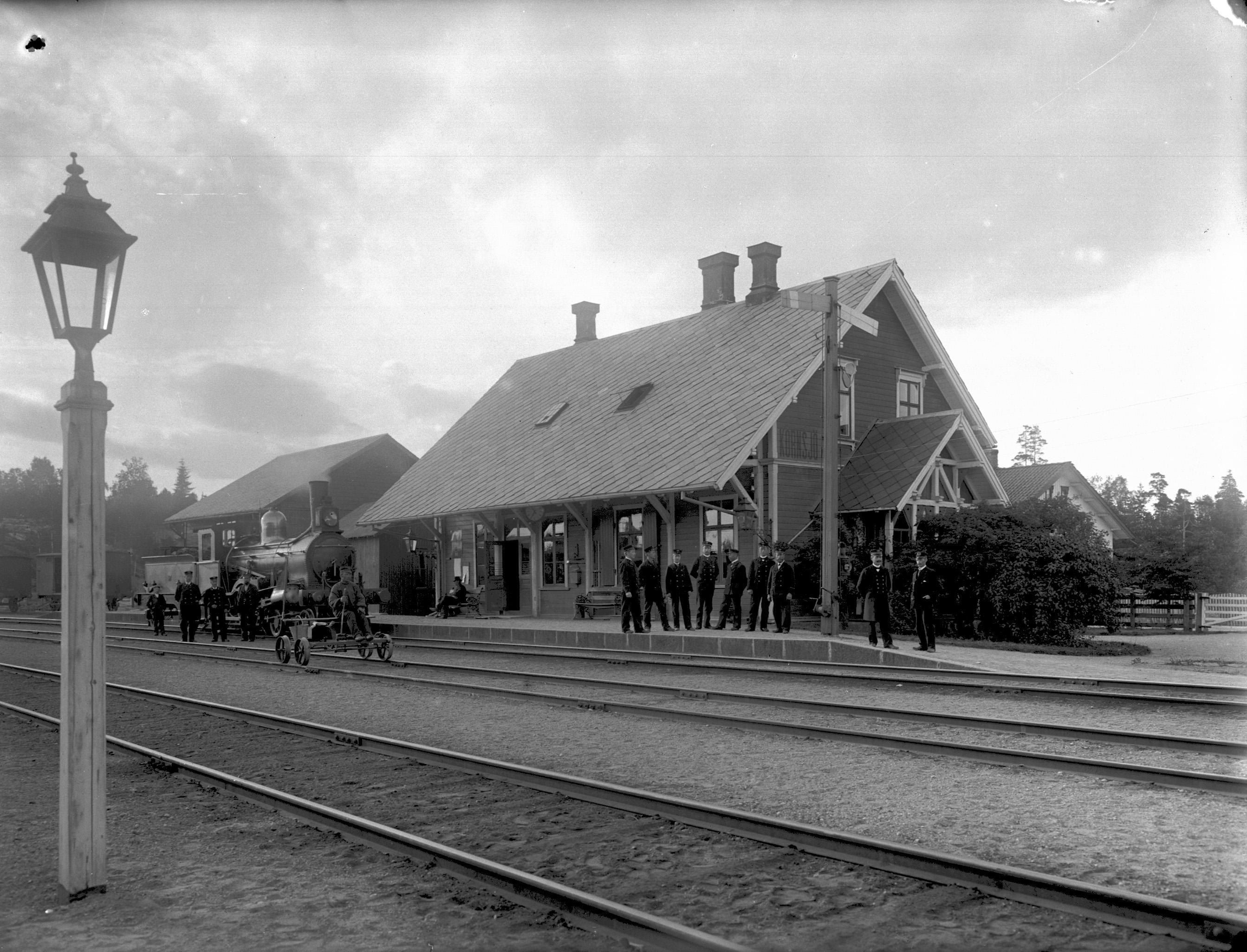 Kornsjøs første stasjonsbygning. Foto: Severin Worm-Petersen (1890-årene). Fra Norsk Teknisk Museums samling i Digitalt museum.